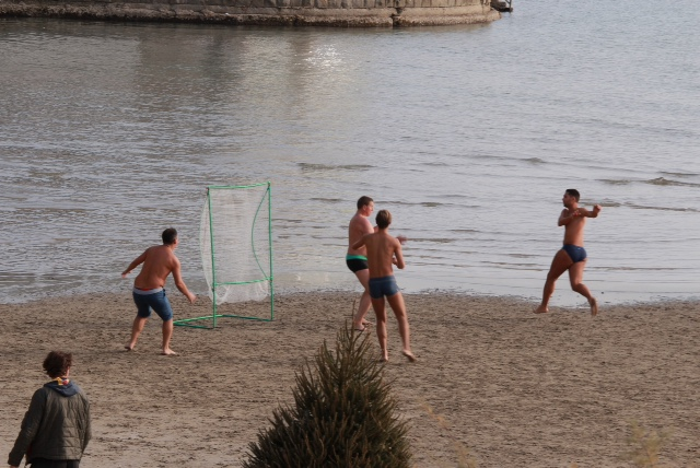 Izgled gola za picigol,picigol na suhom